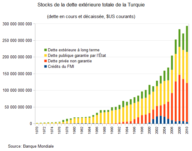 Dette extérieure de la Turquie - Source: Banque Mondiale